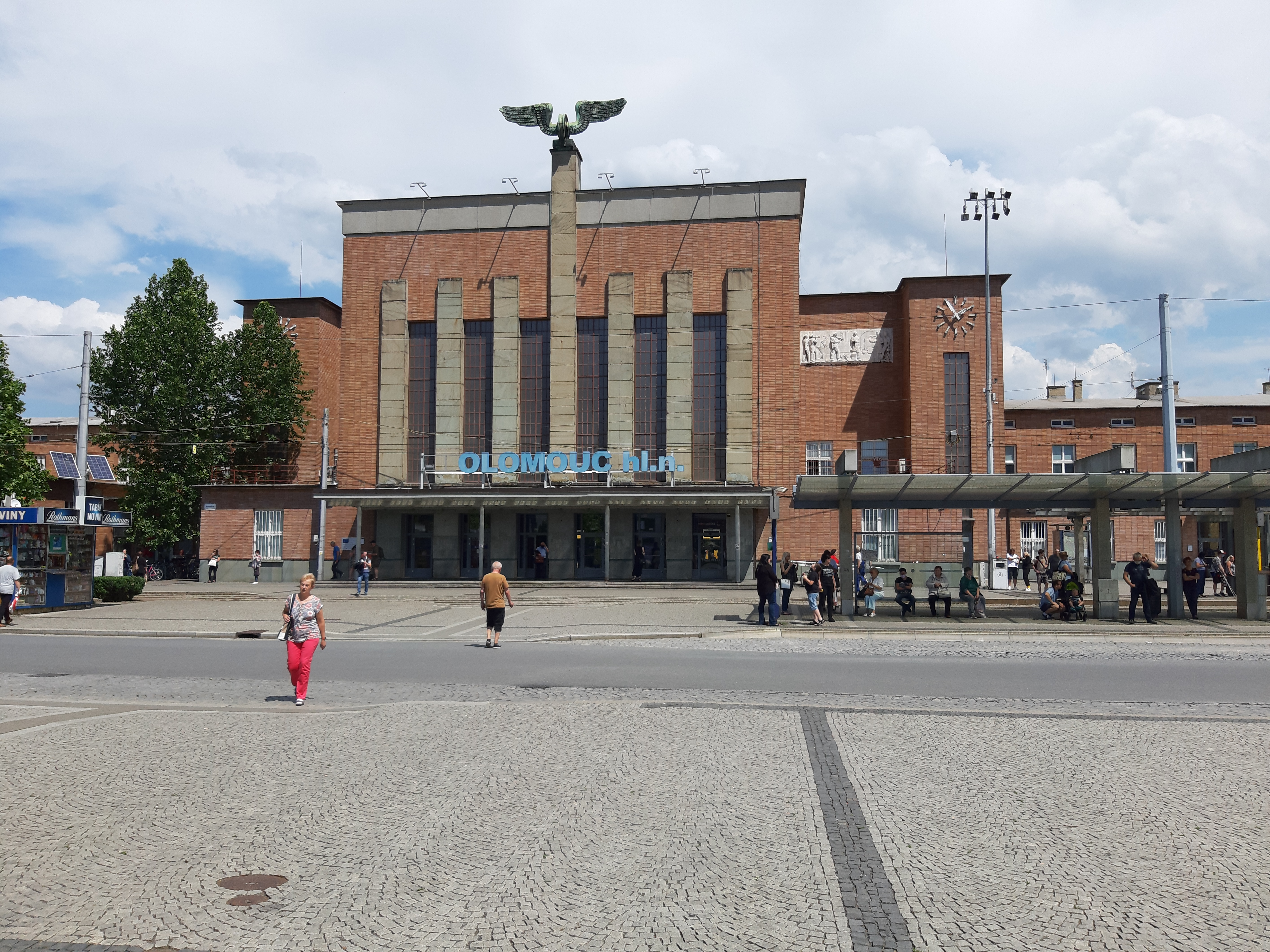 OLOMOUC: střed města a nádraží.